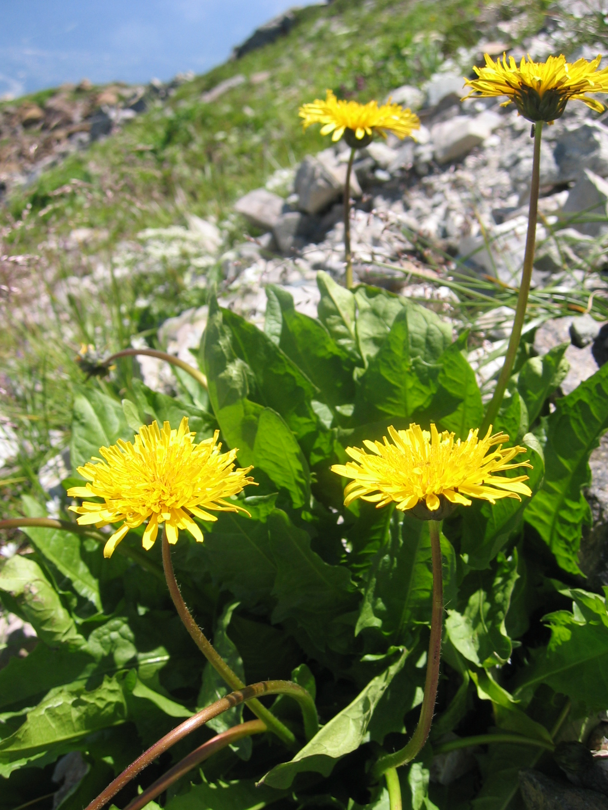 シロウマタンポポ（白馬蒲公英）、Taraxacum alpicola Kitam. var. shiroumense Kitam